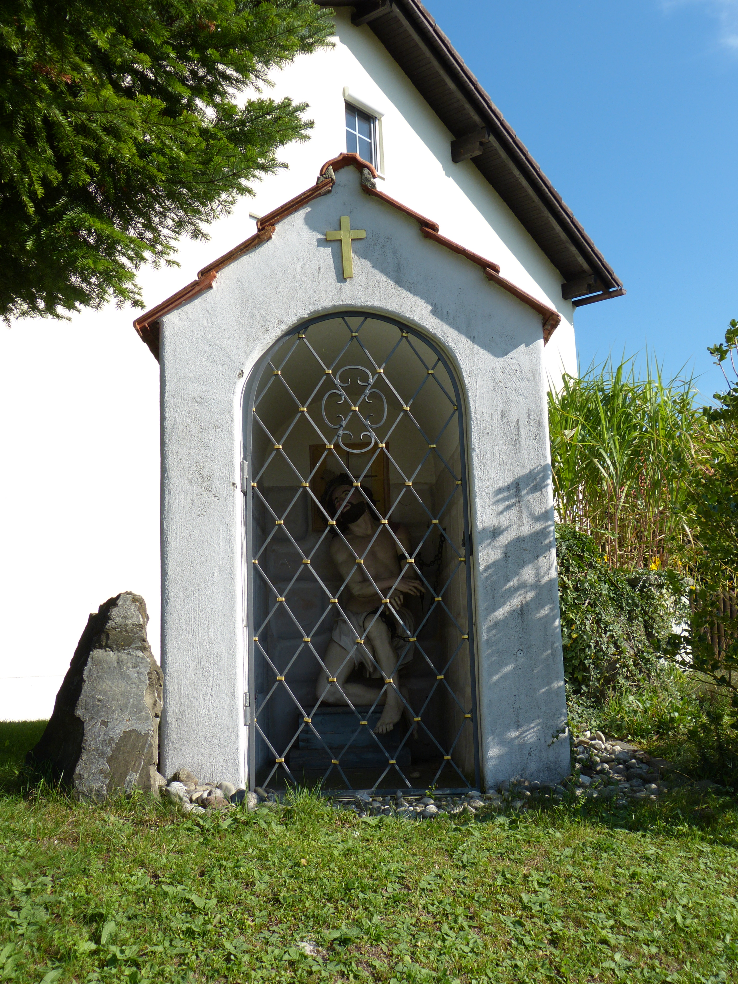 Geißelheiland in Amberg, Landkreis Unterallgäu, BayernThis is a photograph of an architectural monument.